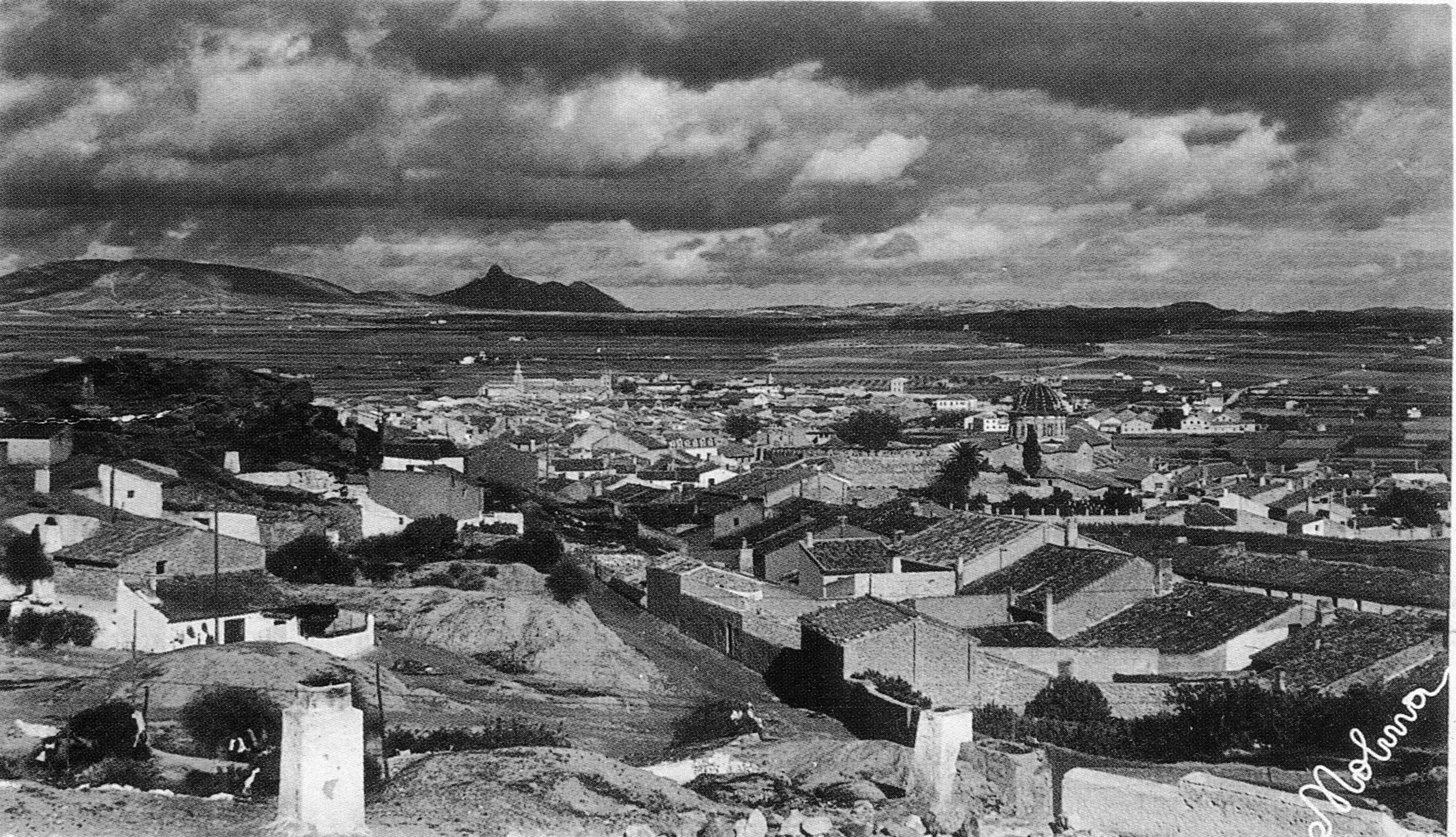 Vista parcial de Caudete desde el barrio de Santa Ana; en primer plano a la derecha destaca la iglesia de Santa Catalina, y al fondo a la izquierda la iglesia de San Francisco y el barrio homónimo.